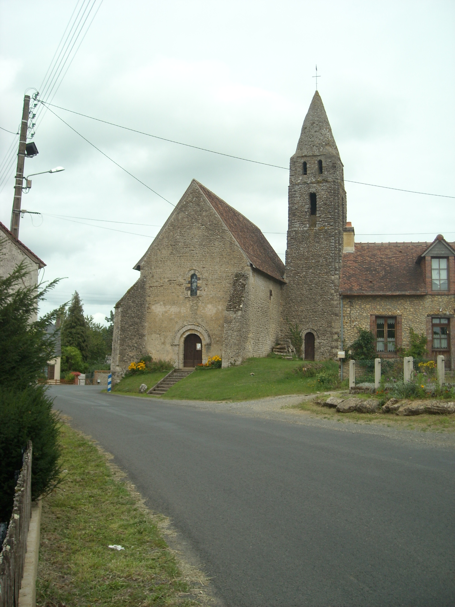 Photo de l'église avec son clocher maçonné.